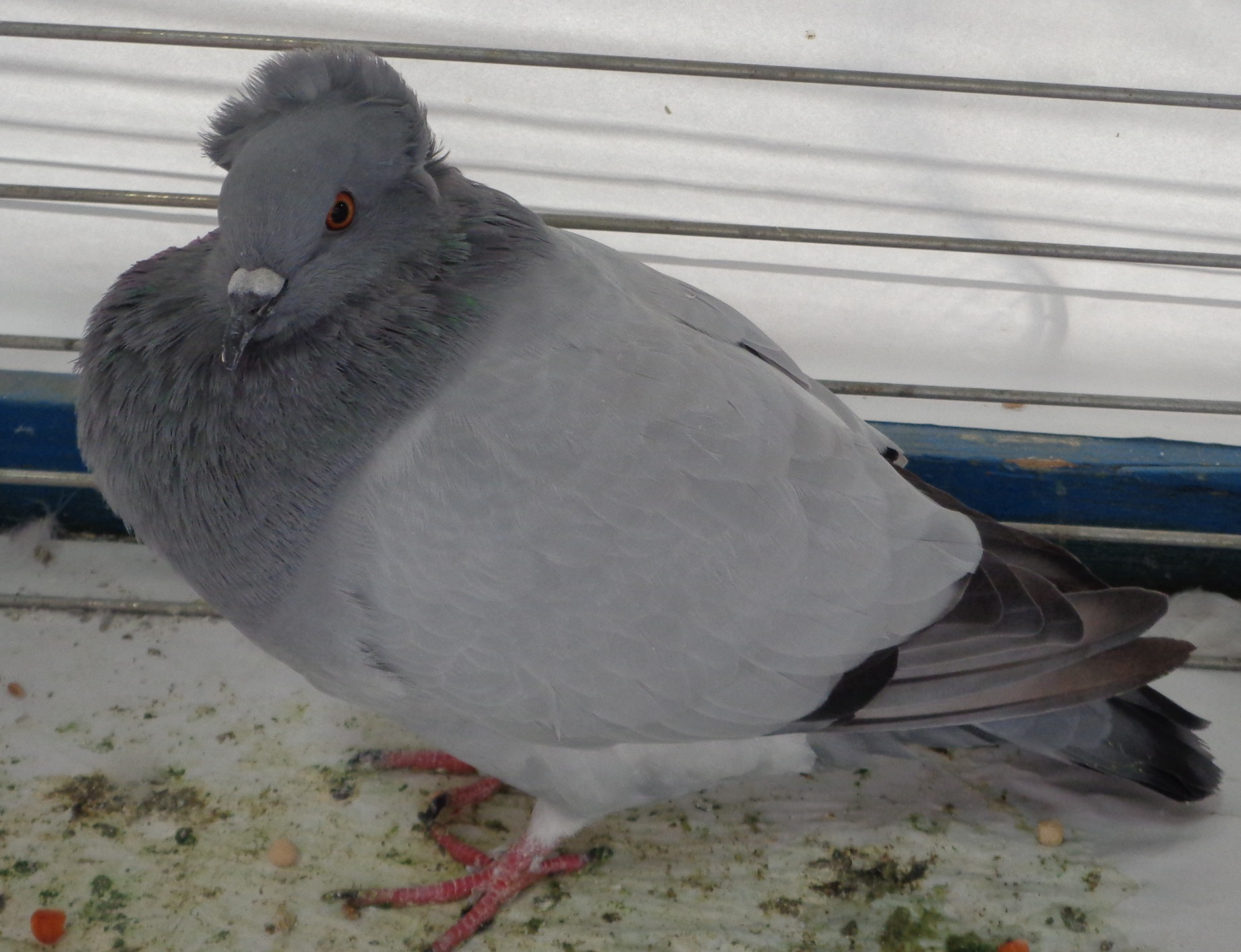 Huppé de Soultz bleu uni